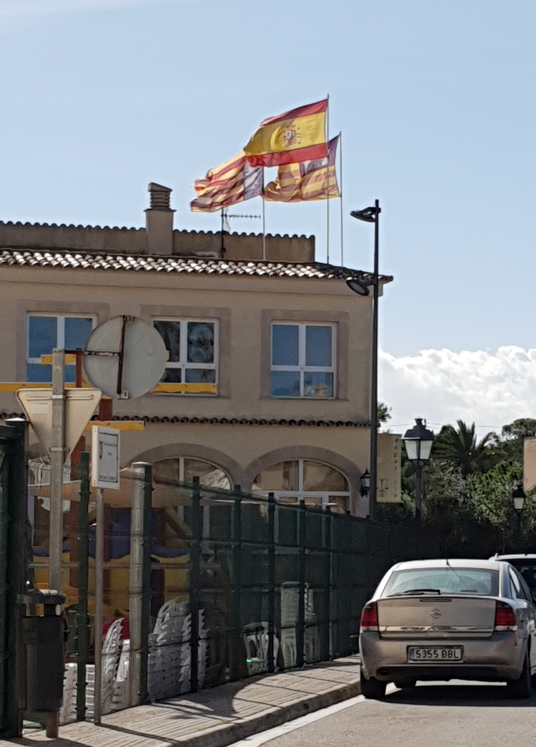 Colegio de la localidad de Calonge, en el municipio de Santañí (Islas Baleares, España)